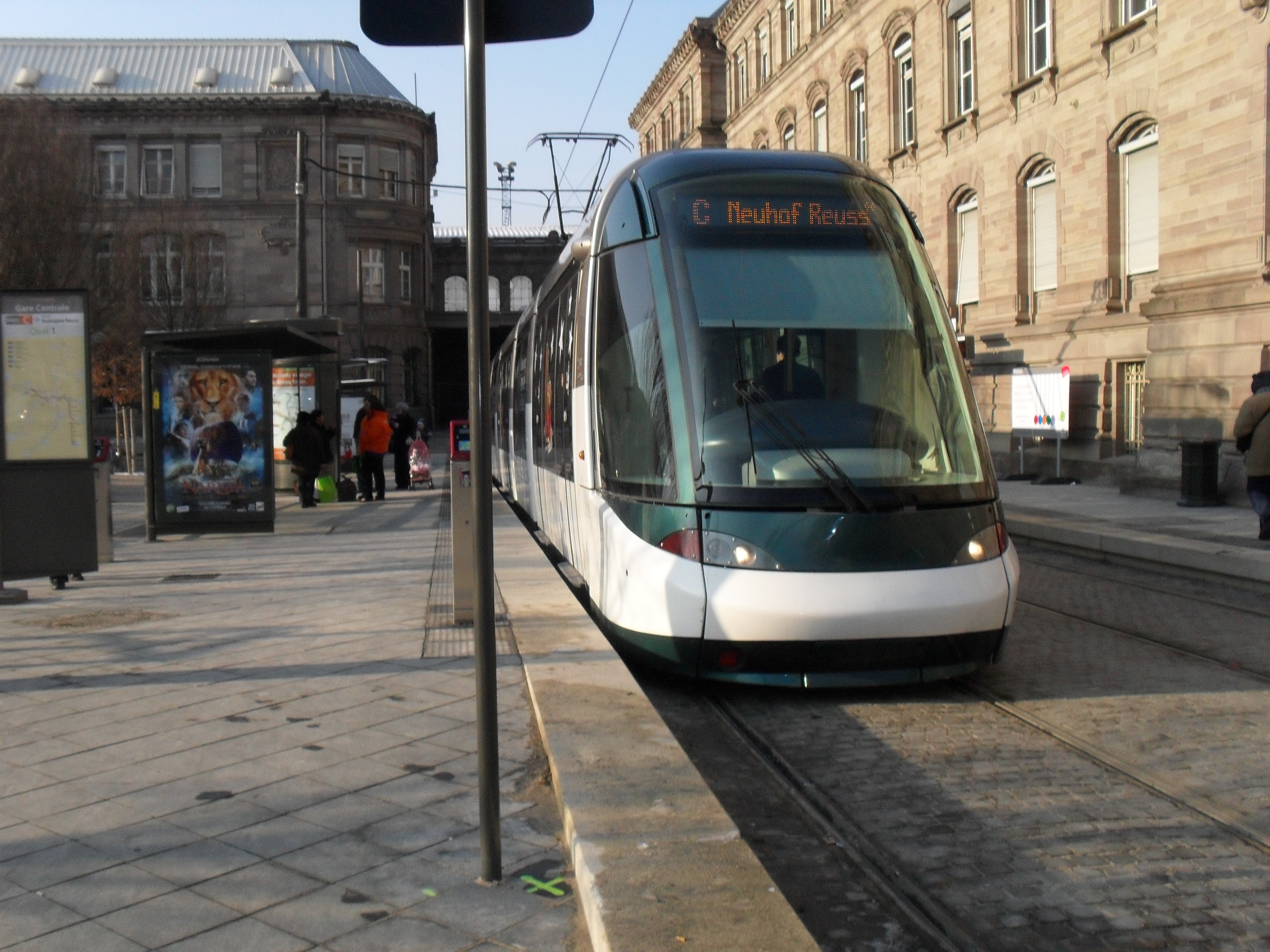 Tram Strasbourg Line C